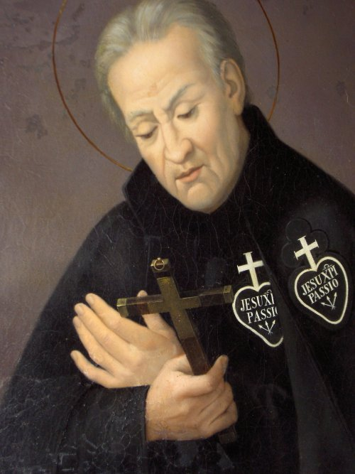 portrait de Paul de la croix